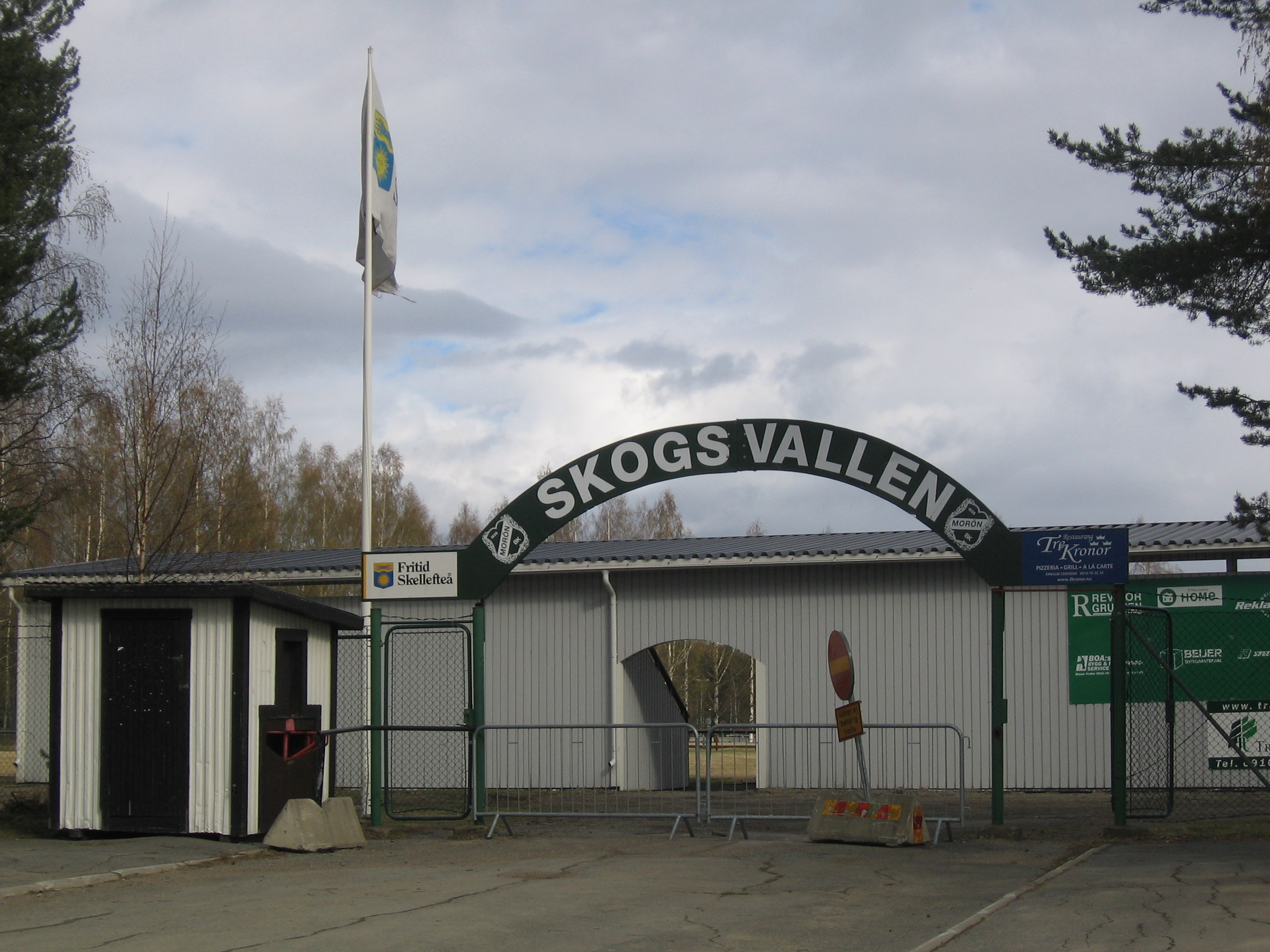 Skogsvallen, Skellefteå